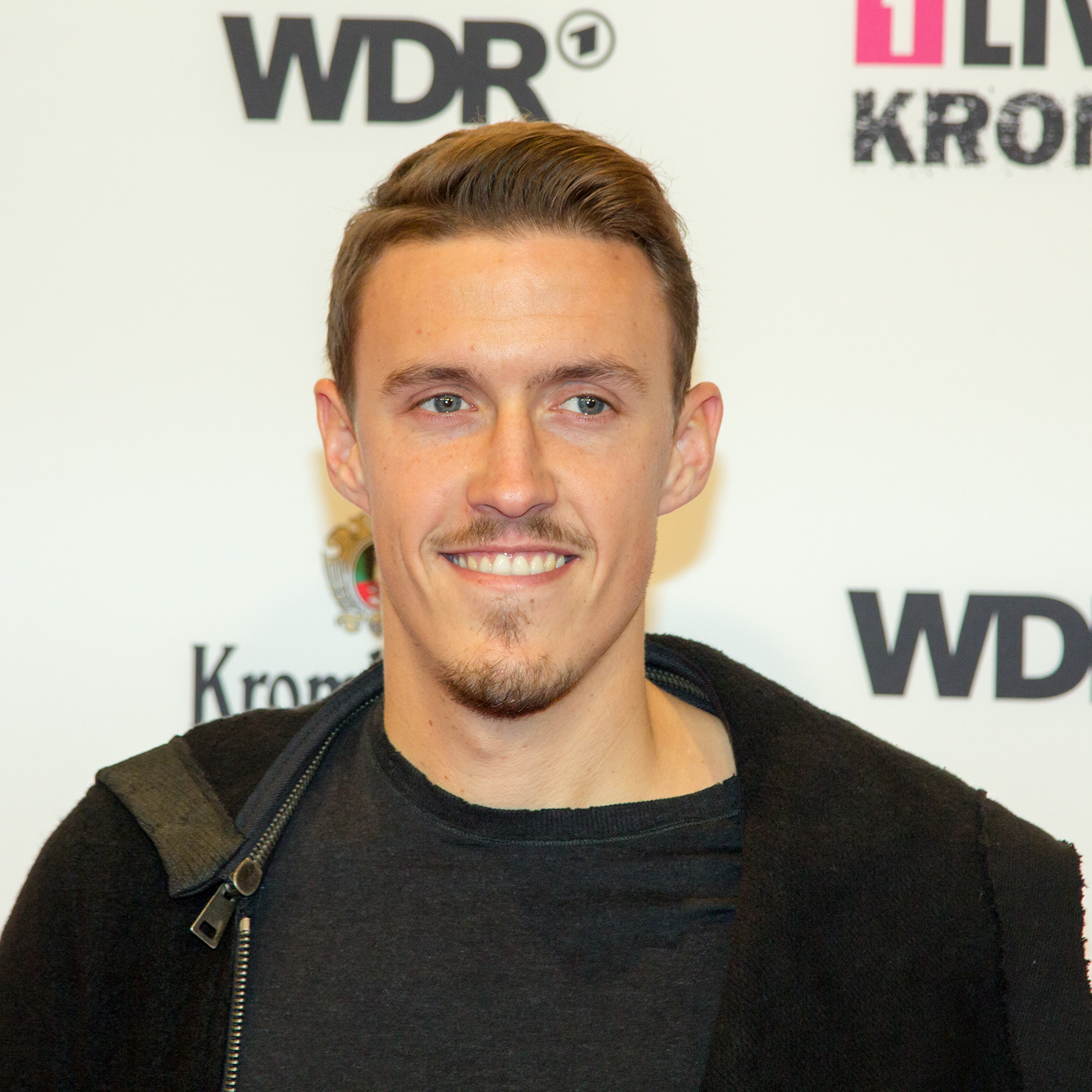 1LIVE Krone 2014 in der Bochumer Jahrhunderthalle: Max Kruse auf dem roten Teppich